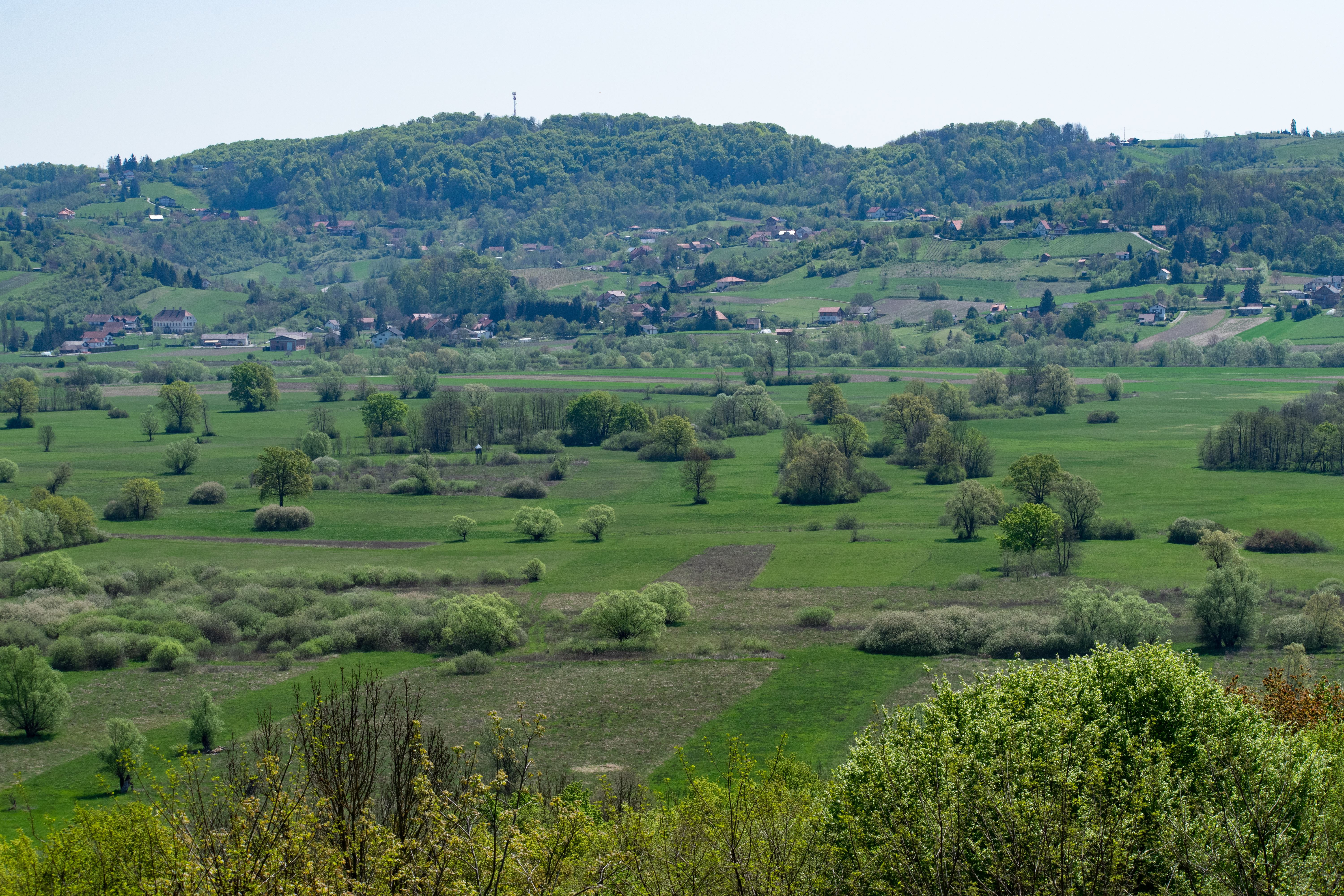 Jovsi